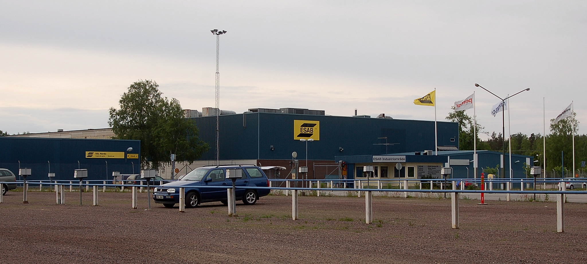 ESABs fabriksbyggnad i Laxå.